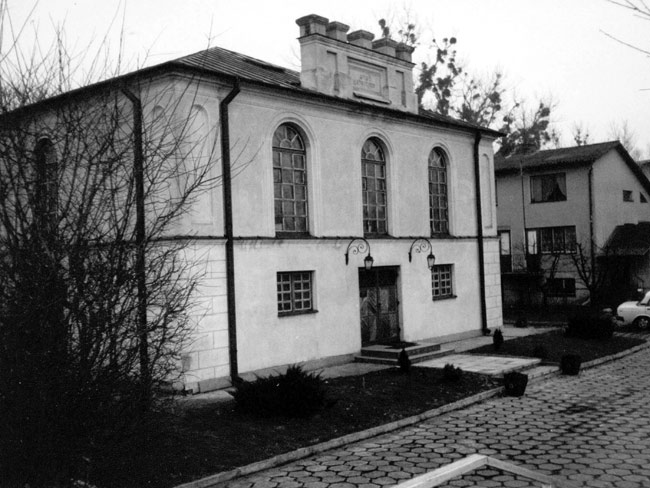 Polska, lubelskie, Wojsławice, Synagoga